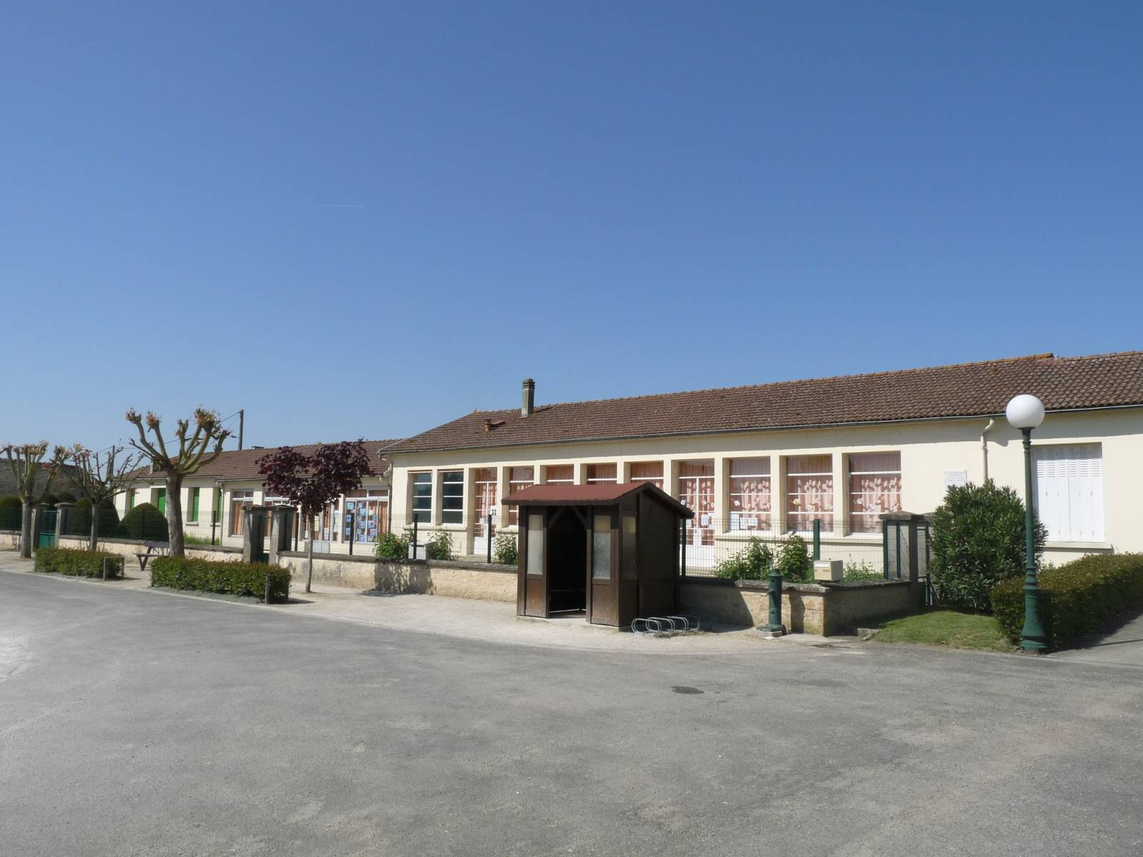 Ecole de Fouqueure, Charente, France